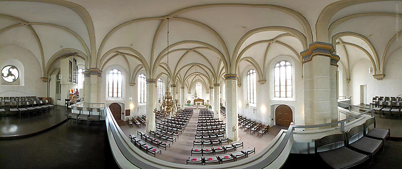 Innenansicht der Petrikirche in Petershagen, Nordrhein-Westfalen.